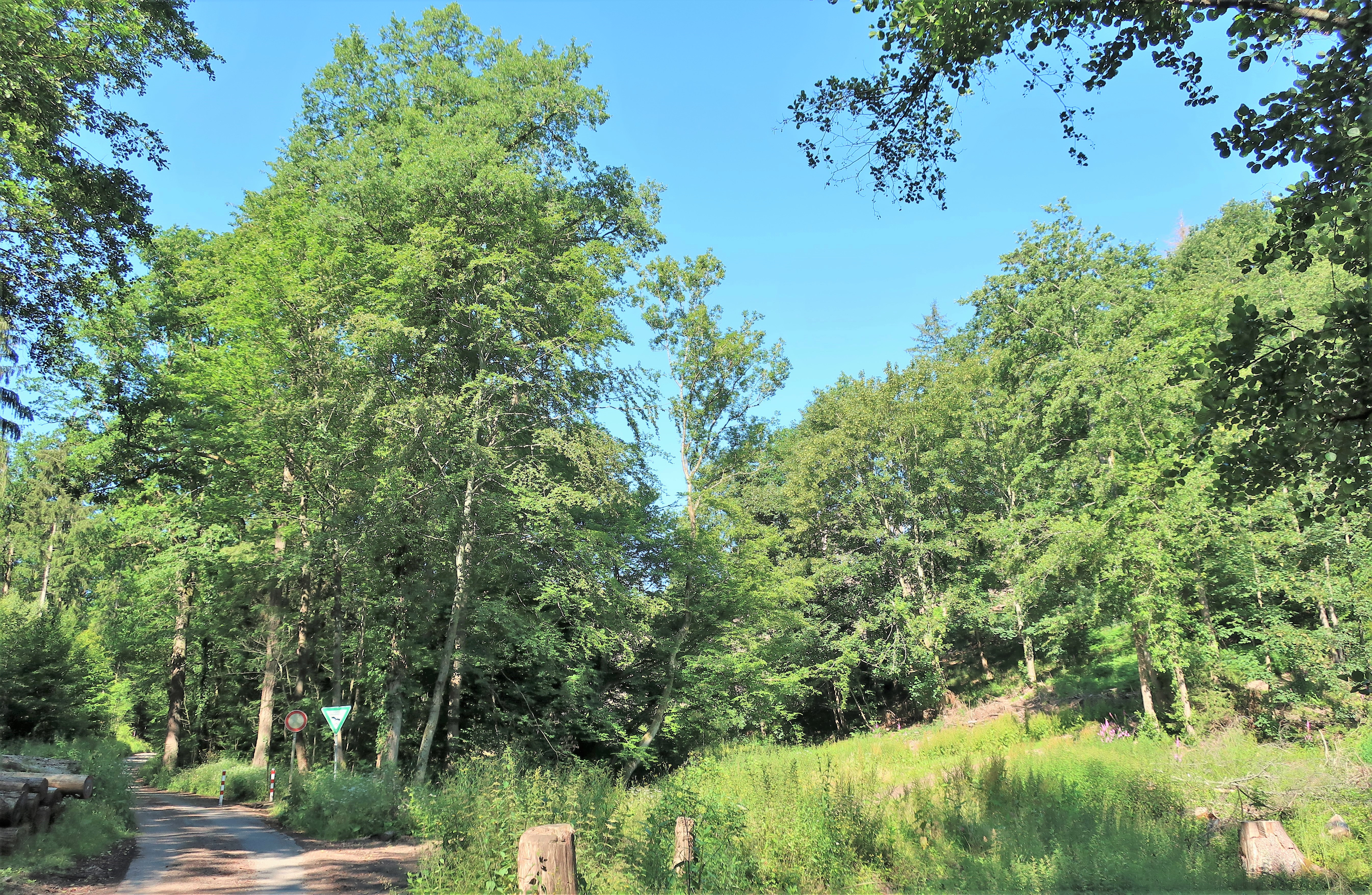 Geschützter Landschaftsbestandteil 1.4.2.66 „Waldwiesen Selbecker Bach“ in Hagen am Oberlauf des Selbecker Baches. Es handelt sich um drei Wiesenparzellen inmitten eines ausgedehnten Waldgebietes.